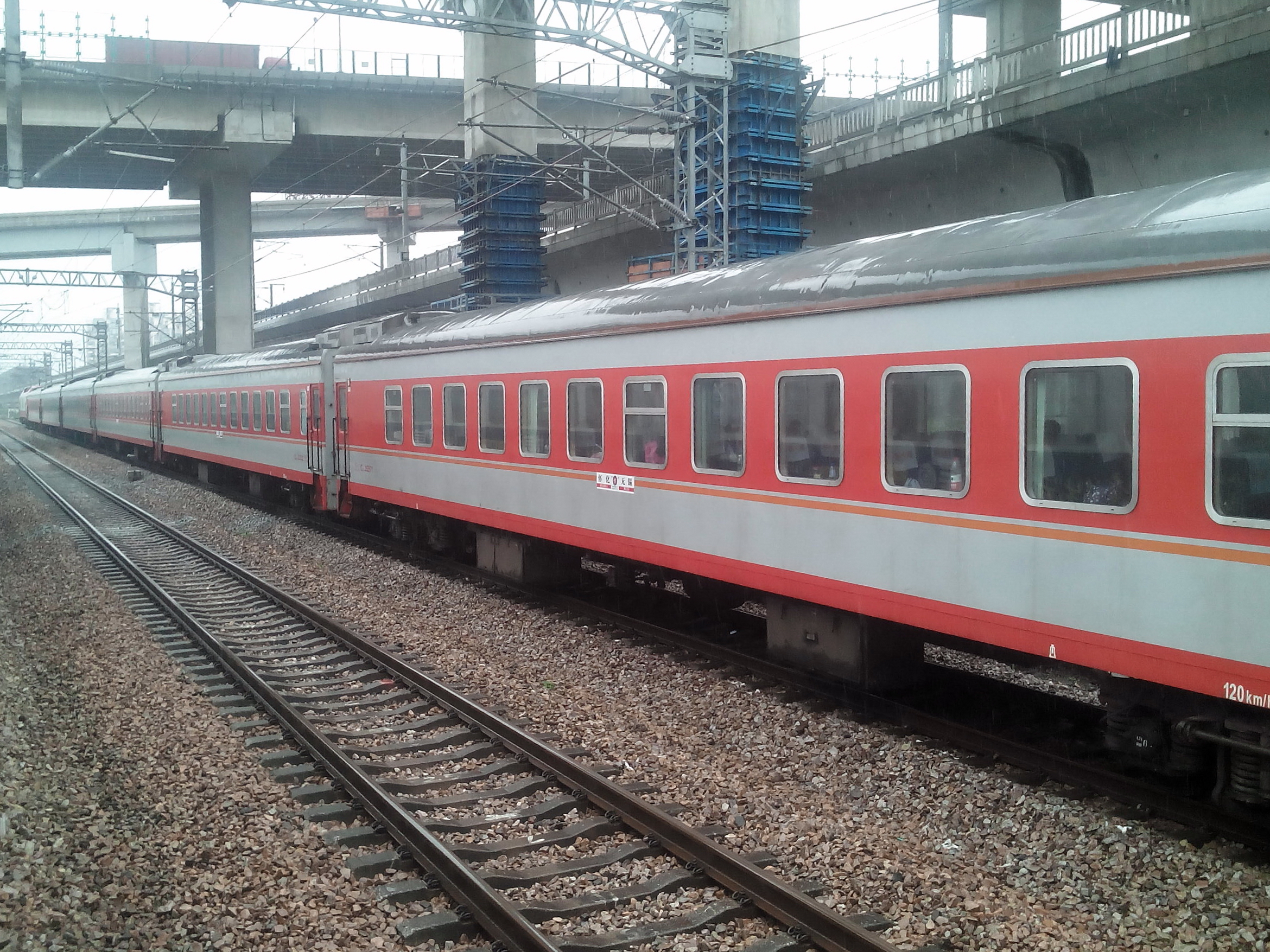 201508七宝站上海方向